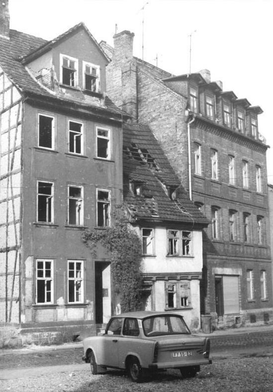 ADN-ZB-Hirndorf-6.12.1989-Erfurt: Noch zu retten? - Vom Abriß bedroht sind auch diese Bauten im Erfurter Andreasviertel, dem größten Flächendenkmal auf dem Gebiet der DDR. Um Verfall und Abriß aufzuhalten, rief die Interessengemeinschaft "Alte Universität Erfurt" für Sonntag, den 10.12.89, zwischen 10.00 und 12.00 zu einer Menschenkette entlang der ehemaligen inneren Stadtmauer von 1168 auf." Information added by Wikimedia users.Webergasse, Erfurt